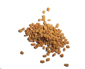 photo fenugrec perso (Trigonella foenum-graecum)